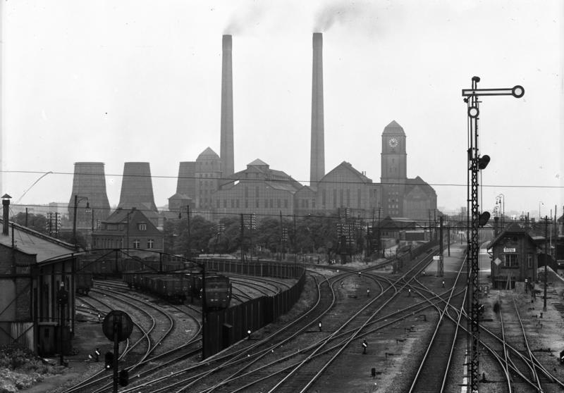 Das Kraftwerk Oberschlesien in Bobrek bei Beuthen O/S. Mit der Elektrischen fährt man in etwa 20 Minuten von Beuthen nach Bobrek. Das Gesicht diese arbeitsamen Industrieortes ist durch die "Julienhütte" und durch das Kraftwerk Oberschlesien bestimmt. In Oberschlesien kam bekanntlich die 1. Dampfmaschine zum Einsatz und zur Entwicklung. Deutsche Fachleute haben in jahrhundertelanger zäher Arbeit das oberschlesische Industriegebiet erschlossen und zu hoher Blüte gebracht. Durch die Volksabstimmung am 20. März 1921 legten die Oberschlesier öffentlich das Treuebekenntnis zu ihrer oberschlesischen Heimat und zu ihrem deutschen Vaterland ab. Rd. 60% der Oberschlesier stimmten für das Verbleiben bei Deutschland. Trotzdem wurde der lebendige Industrieorganismus Oberschlesiens zerschnitten und geteilt. U.a. fielen 53 Gruben an Polen, während nur 14 Deutschland verblieben. Die Vertreibung aus der Heimat nach Deutschlands Zusammenbruch 1945 brachte dem "Land unterm Kreuz" erhöhtes Leid. Im Herzen brennt das verletzte Rechtsgefühl.